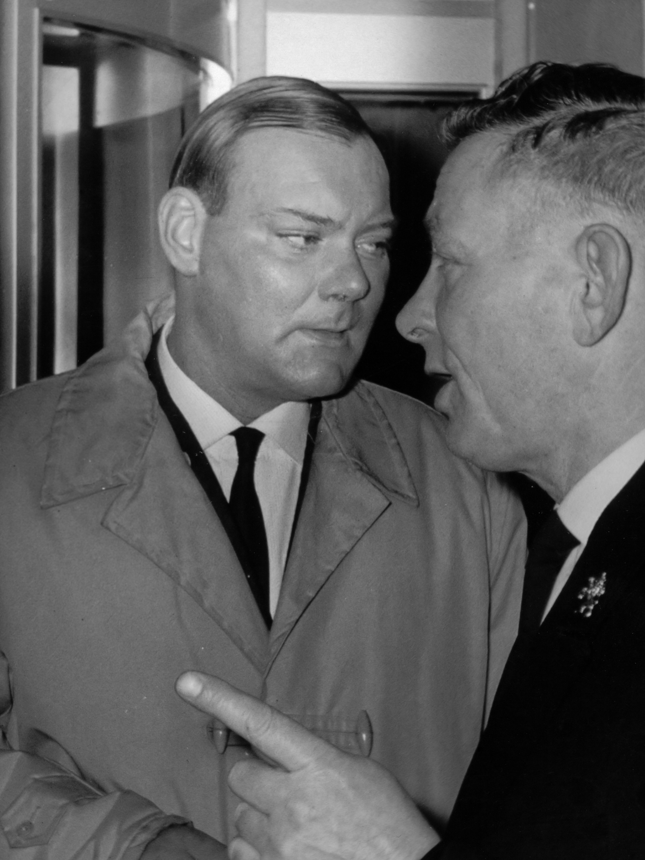 ex ss er, tienen p van 22 december 1964